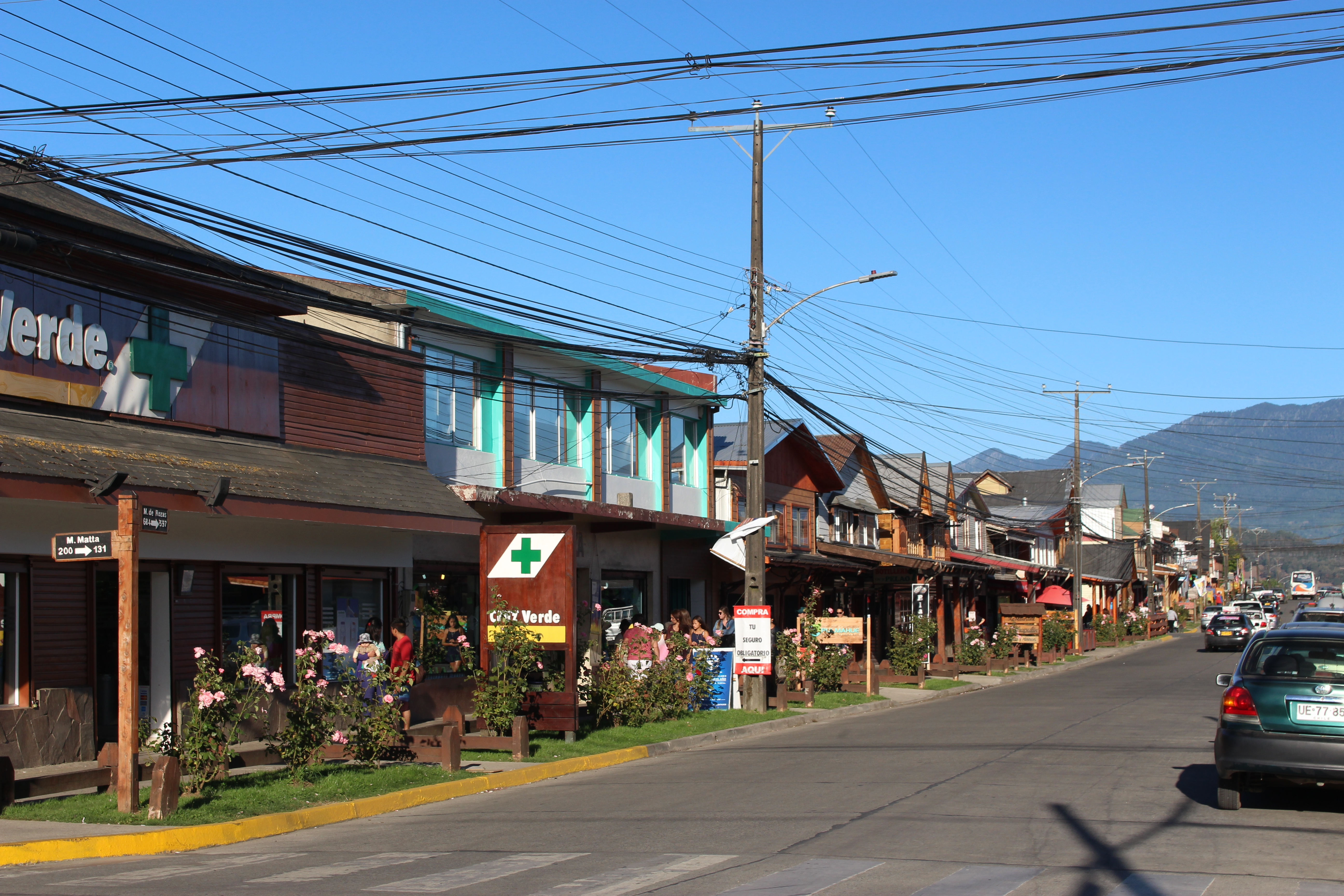 Calle Martínez de Rozas con Manuel Matta, comuna de Panguipulli, región de Los Ríos, Chile